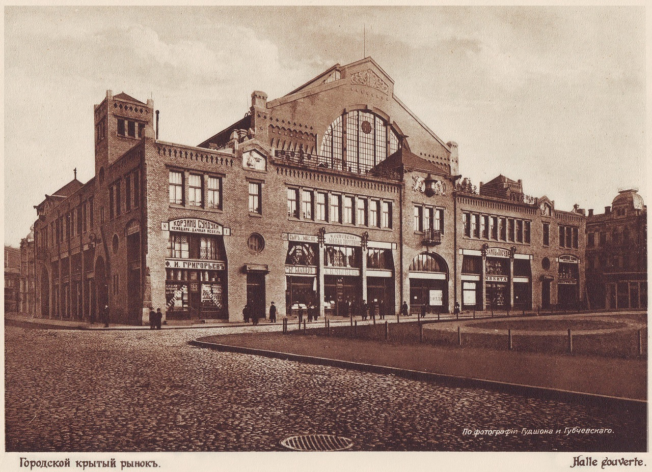 Міський ринок Київ 1911